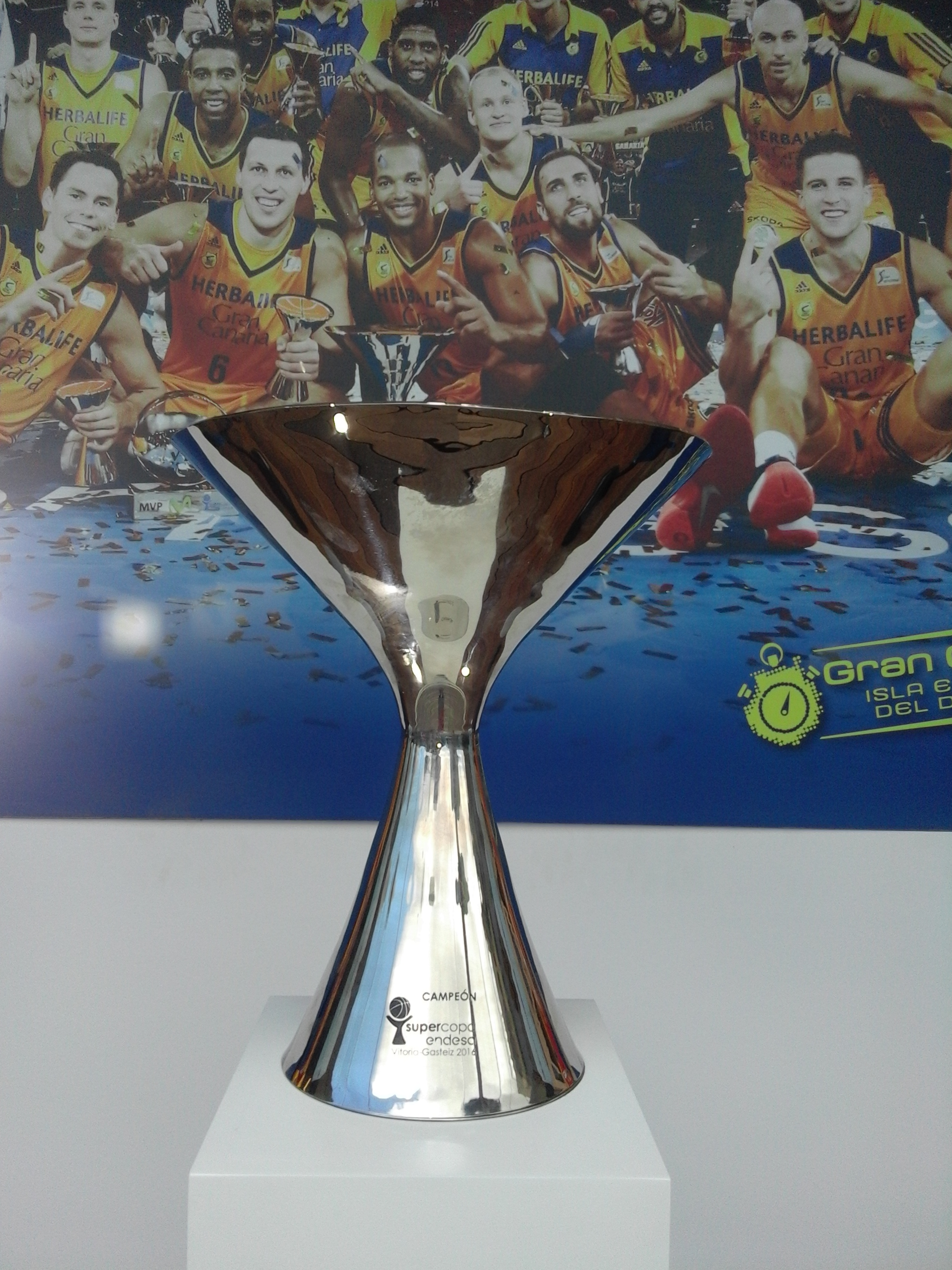 Trofeo de la Supercopa de España de Baloncesto 2016 expuesta en el Cabildo de Gran Canaria.